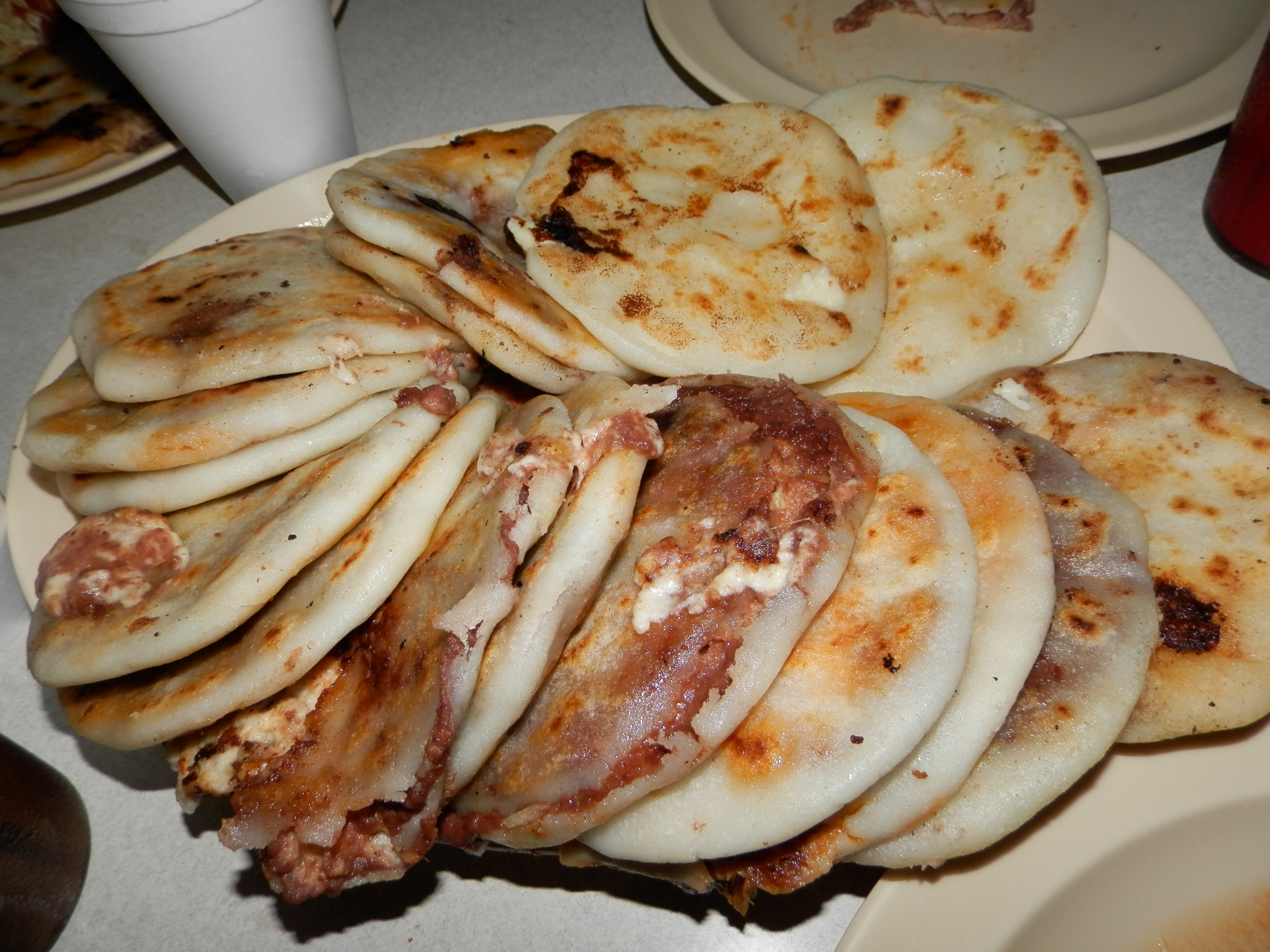 Platillo típico de El Salvador